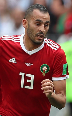 День, когда Роналду вошел в историю. Португалия в Москве обыграла Марокко